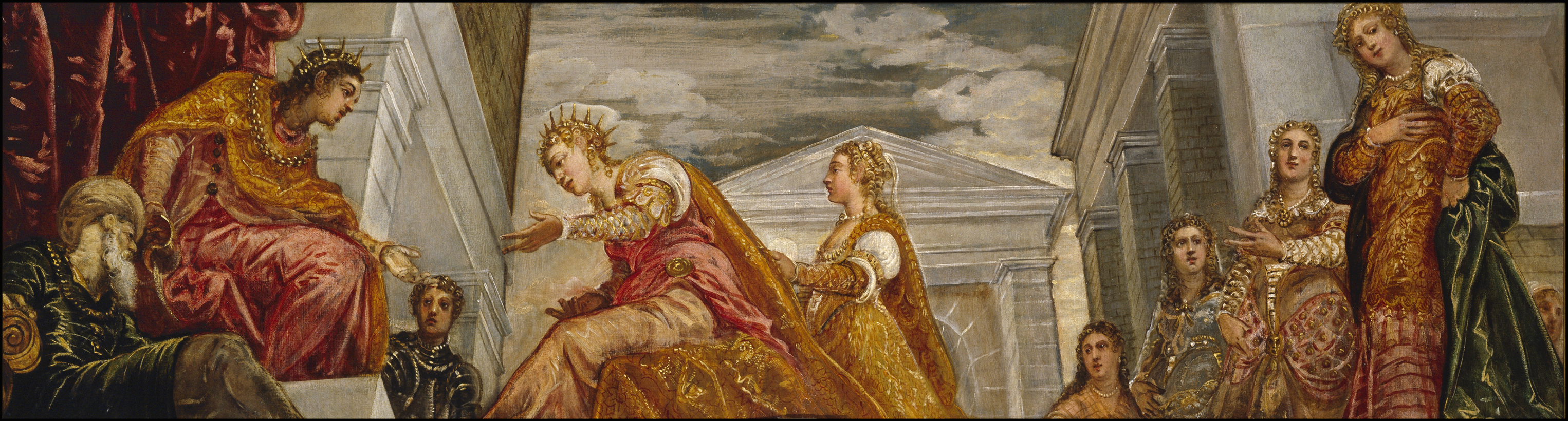 Este lienzo forma parte de un conjunto integrado por seis pinturas apaisadas: Susana y los viejos (P00386), Esther ante Asuero (P00388), Judith y Holofernes (P00389), La reina de Saba ante Salomón (P00394), José y la mujer de Putifar (P00395) y Moisés salvado de las aguas (P00396), con un mismo esquema cromático, una acentuación general del dibujo en superficie y un ritmo de formas curvas que enlaza un cuadro con otro; junto con una obra central ovalada (Purificación del botín de las vírgenes madianitas, P00393). Aunque Velázquez las comprara para Felipe IV como conjunto, no debieron formarlo originariamente. Las obras apaisadas son muy anteriores a la ovalada y de mayor calidad, siendo en esta última mayoritaria la intervención de Domenico. Es evidente que estas obras estaban destinadas a un ambiente profano. Los temas bíblicos han perdido su carga dramática, apenas son un pretexto para mostrar trajes exóticos, ceremonial cortesano y carnes desnudas. Destacan José y la mujer de Putifar (P00395) y Judith y Holofernes (P00389) como lo mejor del ciclo, sobre todo los desnudos de bello modelado de la mujer de Putifar y Holofernes. No hay nada parecido a estos cuadros en la producción restante de Tintoretto y, por lo tanto, es difícil datarlos con certeza. La repetición regular de pequeñas pinceladas caligráficas, en las borlas de los vestidos y tocados, las hojas de la vegetación, formas ensortijadas de los rizos y tocados femeninos, crean un ritmo decorativo global que no se repetirá en ninguna de sus obras (Texto extractado de Falomir, Miguel: Tintoretto, Museo Nacional del Prado, 2007, pp. 177 y 258-265).